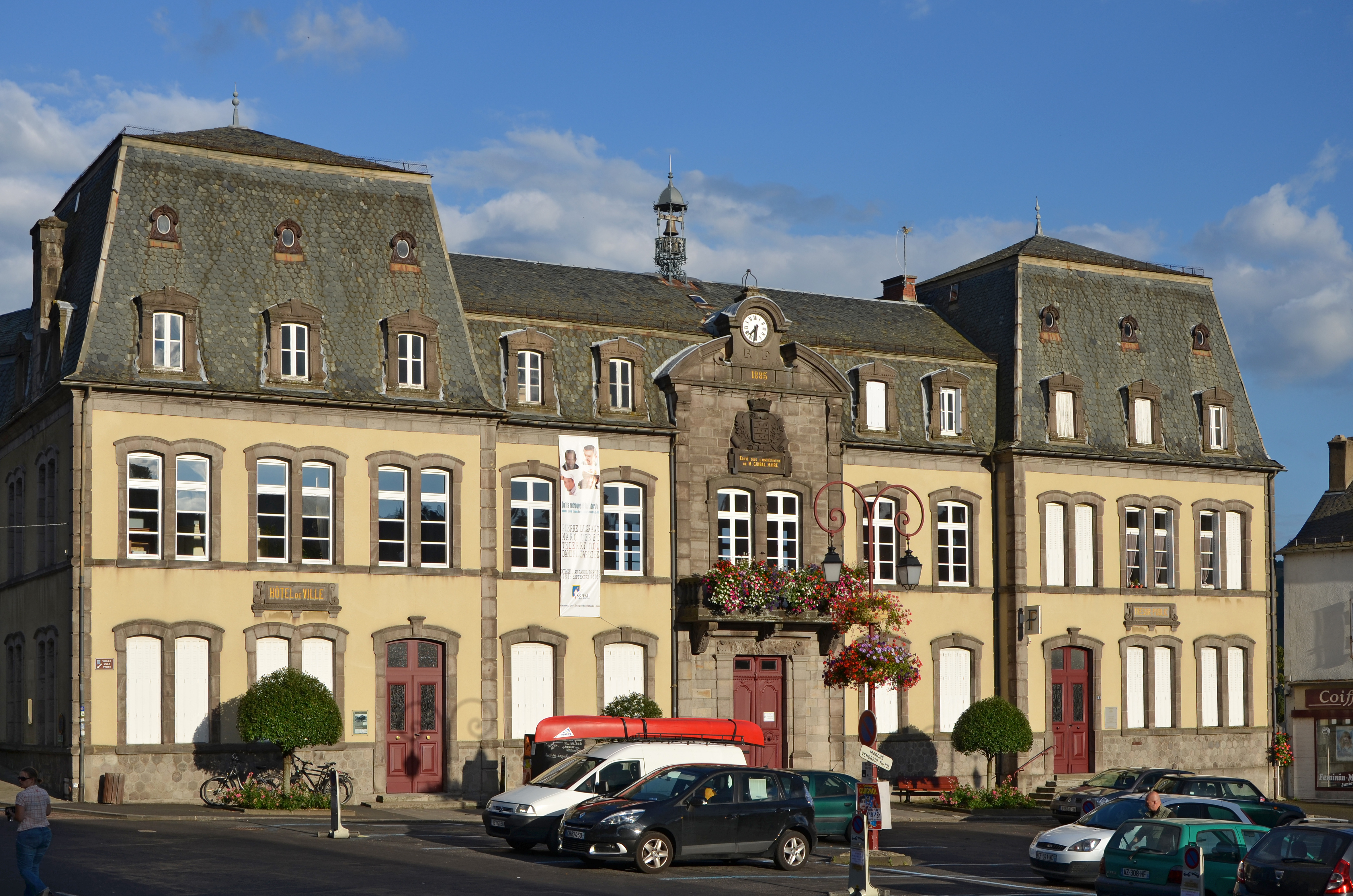 Hôtel de ville de Murat, Cantal, France